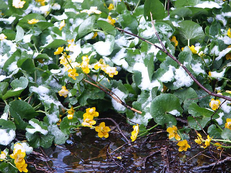 Sumpfdotterblumen im letzten Schnee des Fruhjahres 2005 im Roten Moor